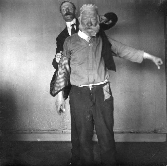 Nationaal Archief / Spaarnestad Photo / Het Leven, SFA001009885 Hadjememaar, de Amsterdamse zwerver die gemeenteraadslid werd, wordt aangekleed als een echte heer, 1921. Collectie Spaarnestad Voor meer informatie en voor meer foto’s uit de collectie van Spaarnestad Photo, bezoek onze Beeldbank: U kunt ons helpen onze kennis van de fotocollecties te verrijken door tags en commentaren toe te voegen. Herkent u mensen of locaties of heeft u een bijzonder verhaal te vertellen bij één van de foto’s, laat dan een reactie achter (als u ingelogd bent bij Flickr) of stuur een mailtje naar: You can help us gain more knowledge on the content of our collection by simply adding a comment with information. If you do not wish to log in, you can write an e-mail to